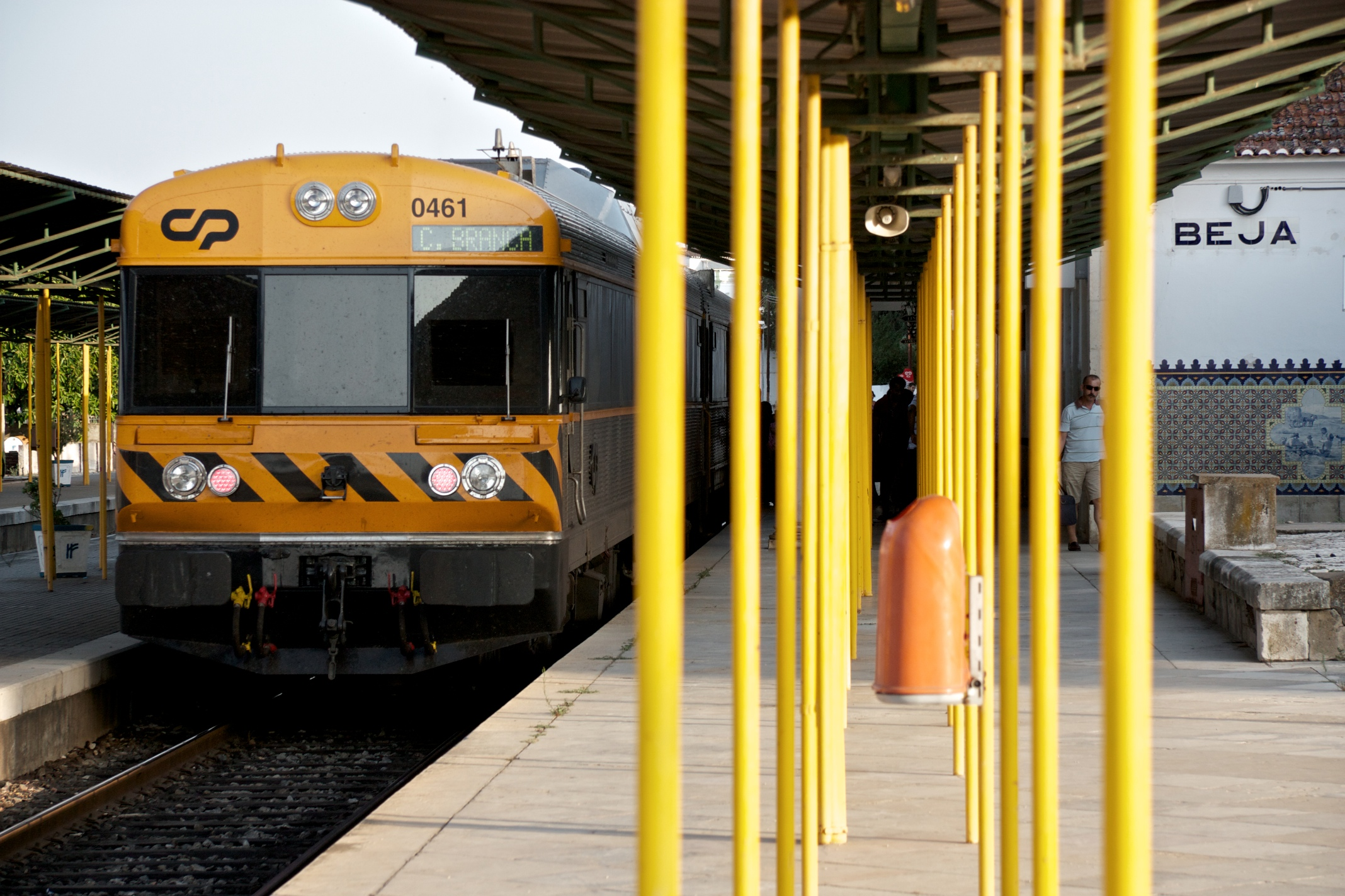 Tipo: Comboio Intercidades 589 [Casa Branca - Beja] Local: Estação de Beja [Linha do Alentejo , PK 153 • Ramal de Moura , PK 153] Data e hora: 12 de Agosto de 2011 [19h24] Material: Automotora 0461 [Unidade Dupla Diesel]